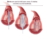 Pose d'un stent